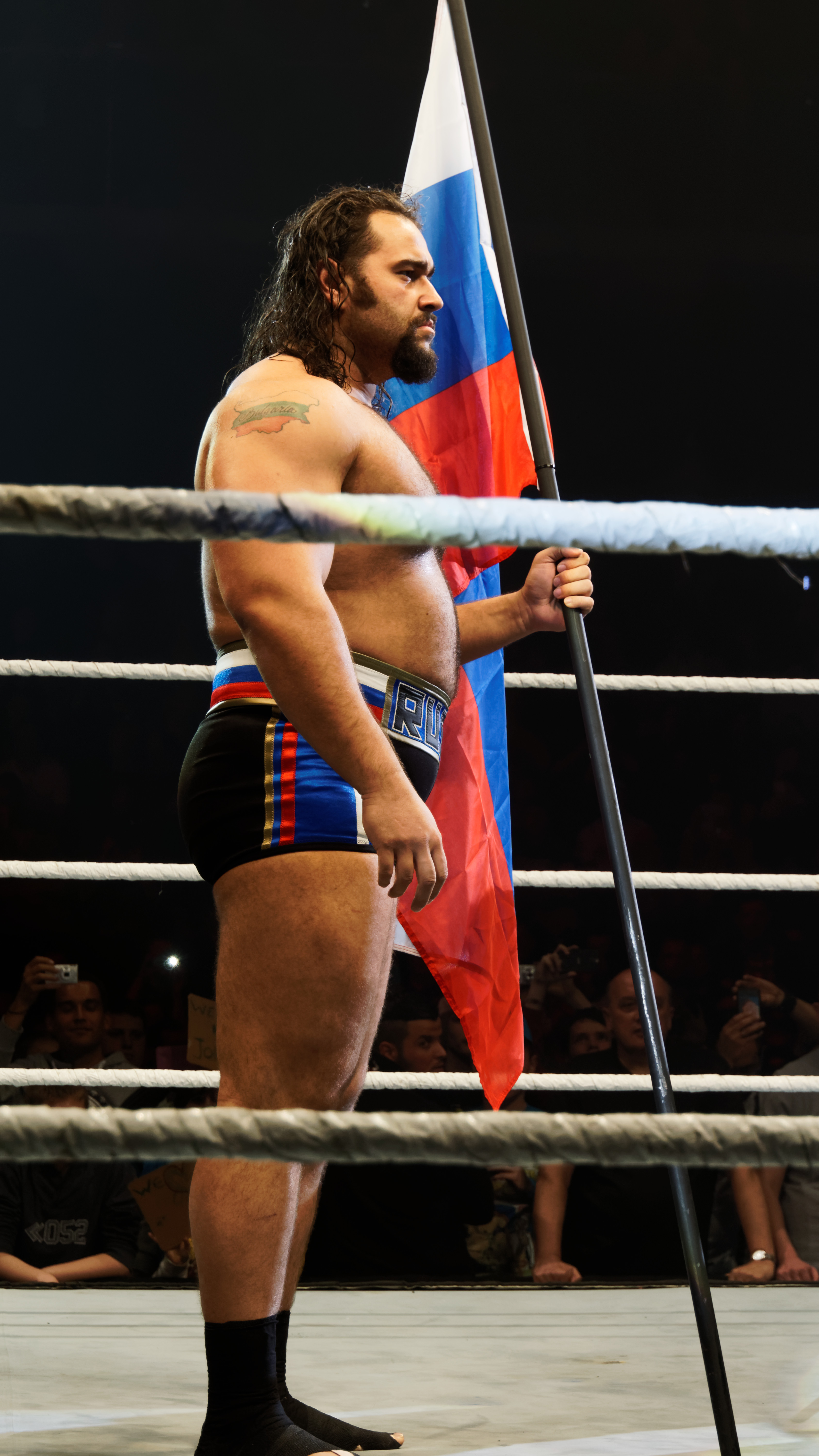 WWE Live@Lotto Arena - Antwerpen